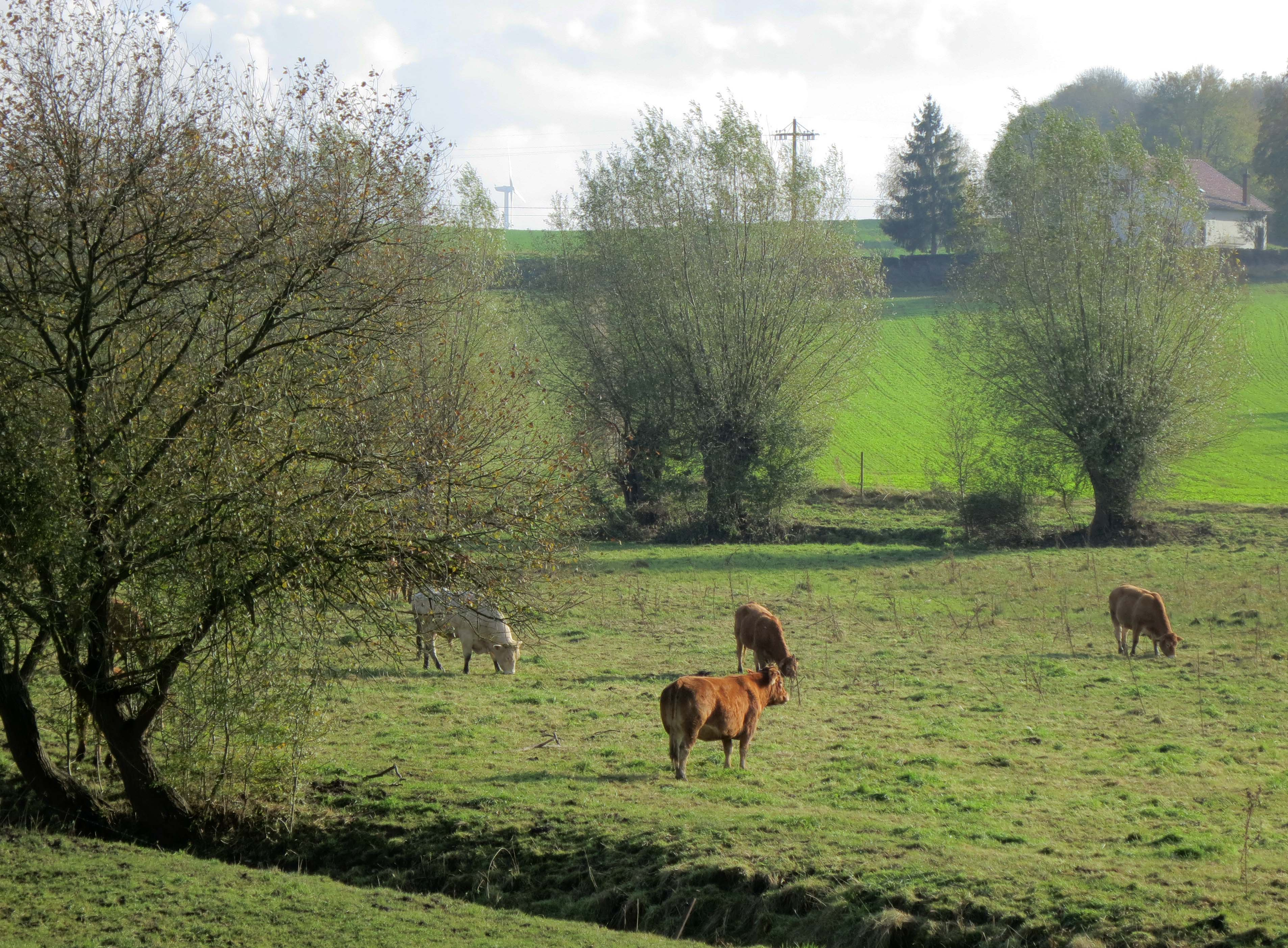 Dreye